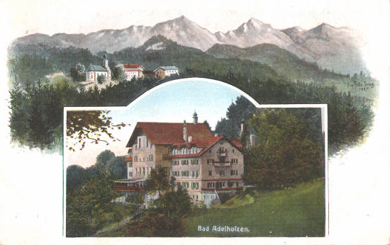 Ansichtskarte Motiv: Bad Adelholzen, Siegsdorf, Bayern